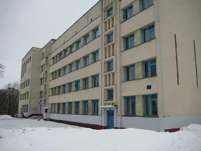 ВГАВМ - ФПК